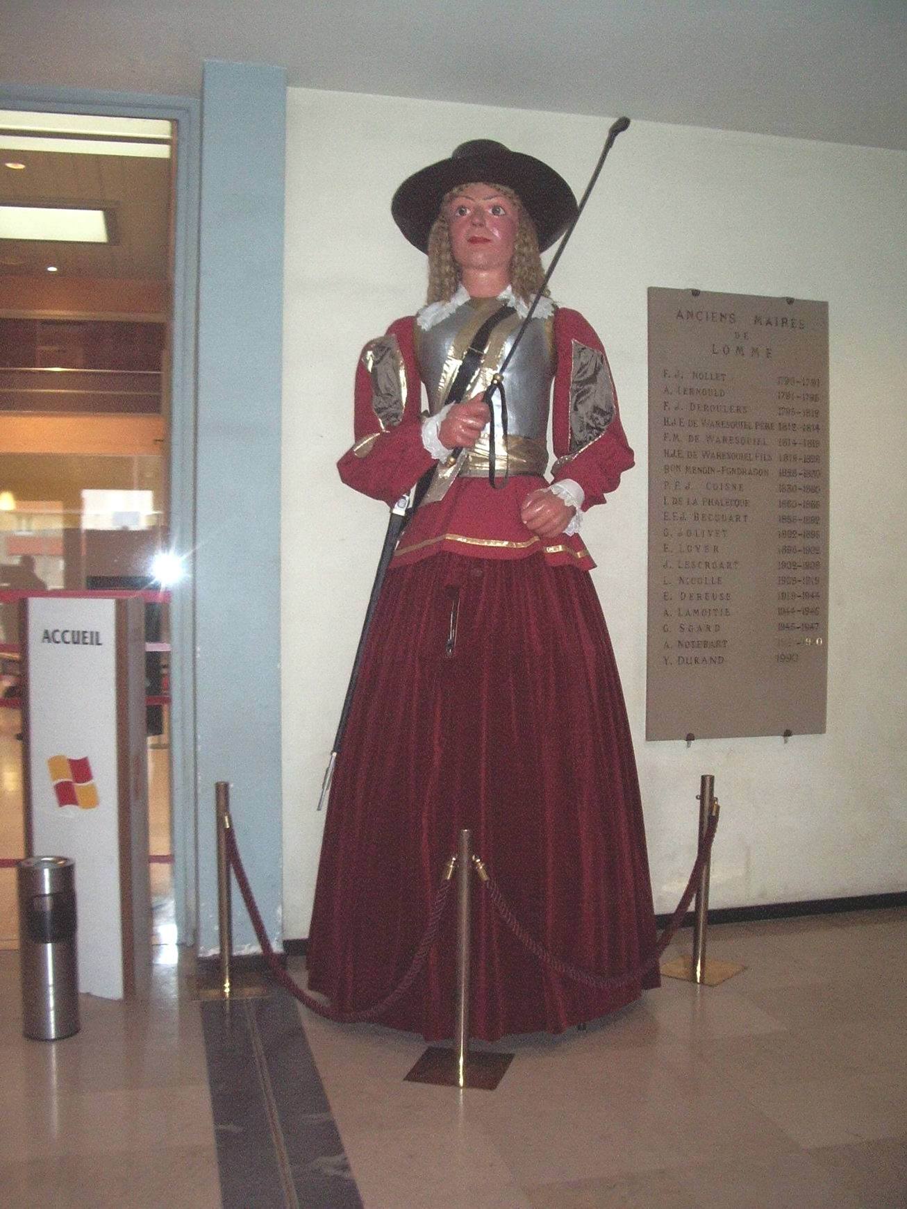 géant de Lomme Yan yan yan yan situé dans le hall d'entrée de la mairie de lomme